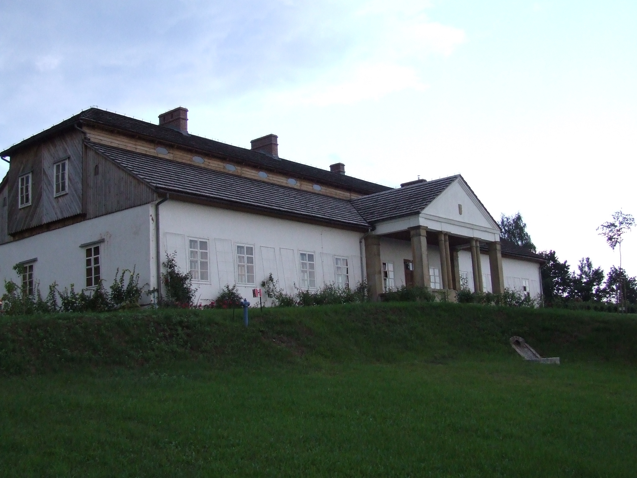 Wygiełzów, skansen, dwór z Drogini